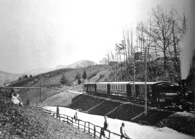 Zug der Appenzeller Bahn beim Alten Zoll unterhalb Herisau.